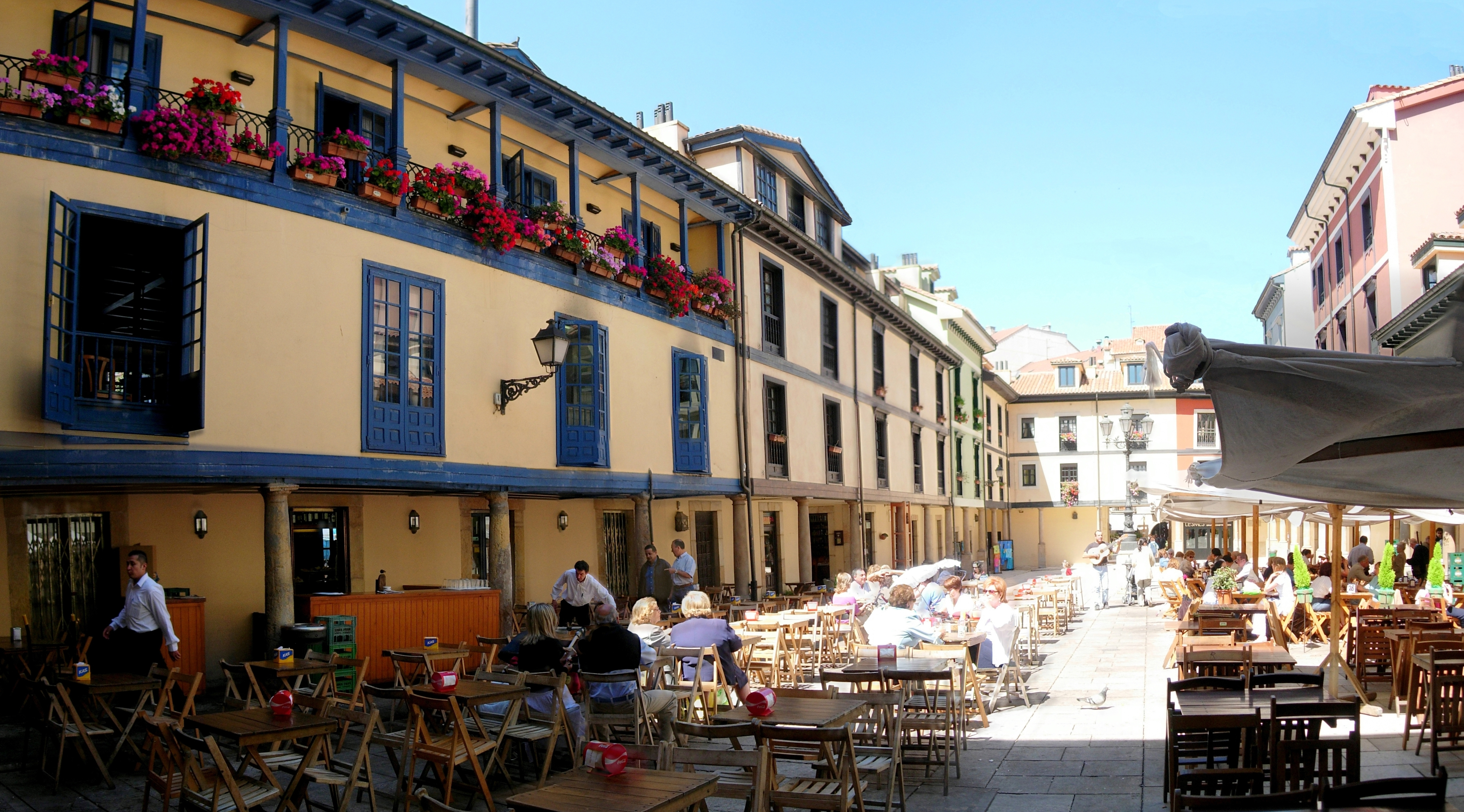 Big size Fontán viene de fuente o más bien de esas fuentes que manan de la tierra formando una charca ó FONTAN, como llamamos aquí en Asturias a las pequeñas charcas. Aunque el unico Fontán que conozco por estos lares es este y es uno de los espacios más típicos de la ciudad.